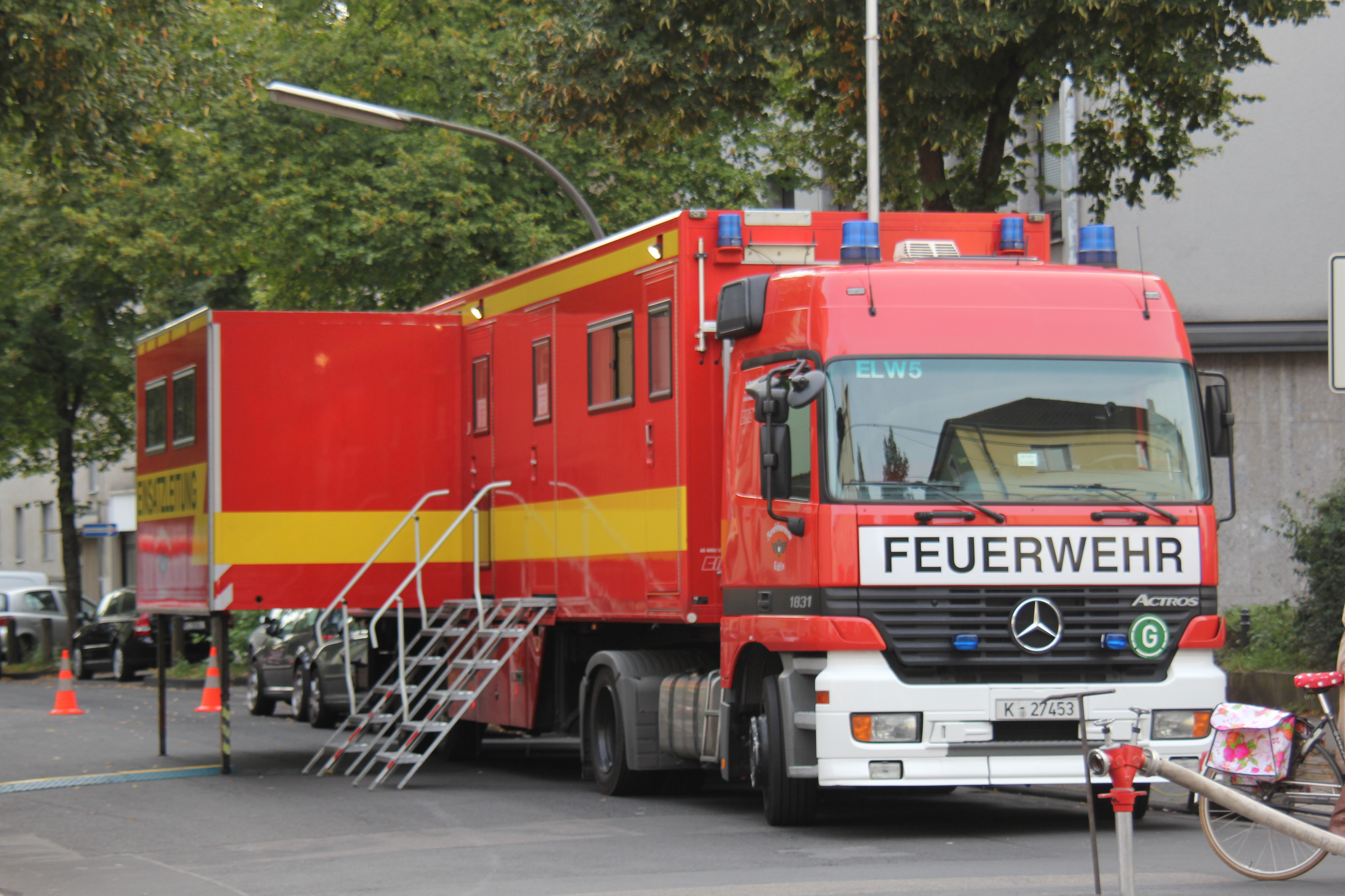 Einsatzleitwagen 5 der Kölner Berufsfeuerwehr. Einsatz bei einem Großbrand in Köln-Neuehrenfeld am 21. September 2009